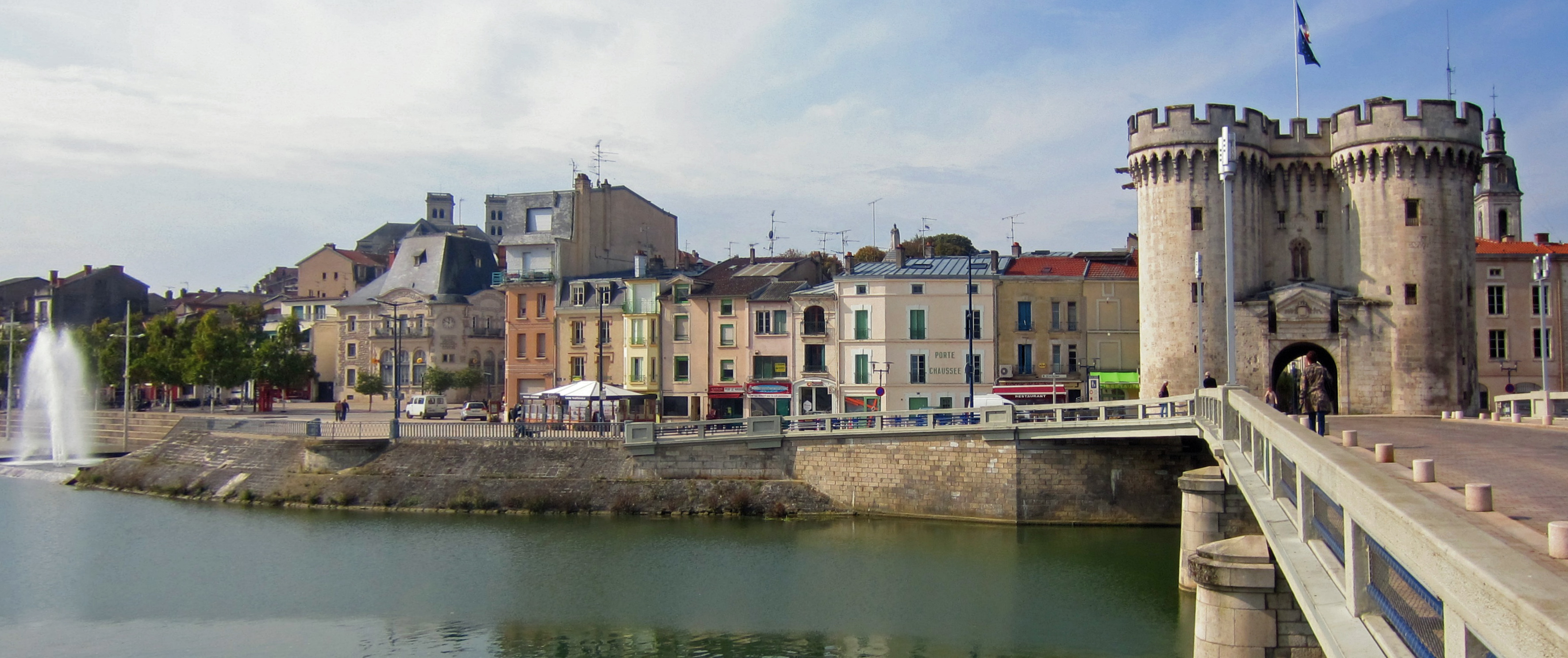 Porte Verdun